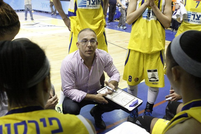 המאמן עדני דגן מתדרך את שחקניות מכבי בנות אשדוד במשחק האליפות 2011/12